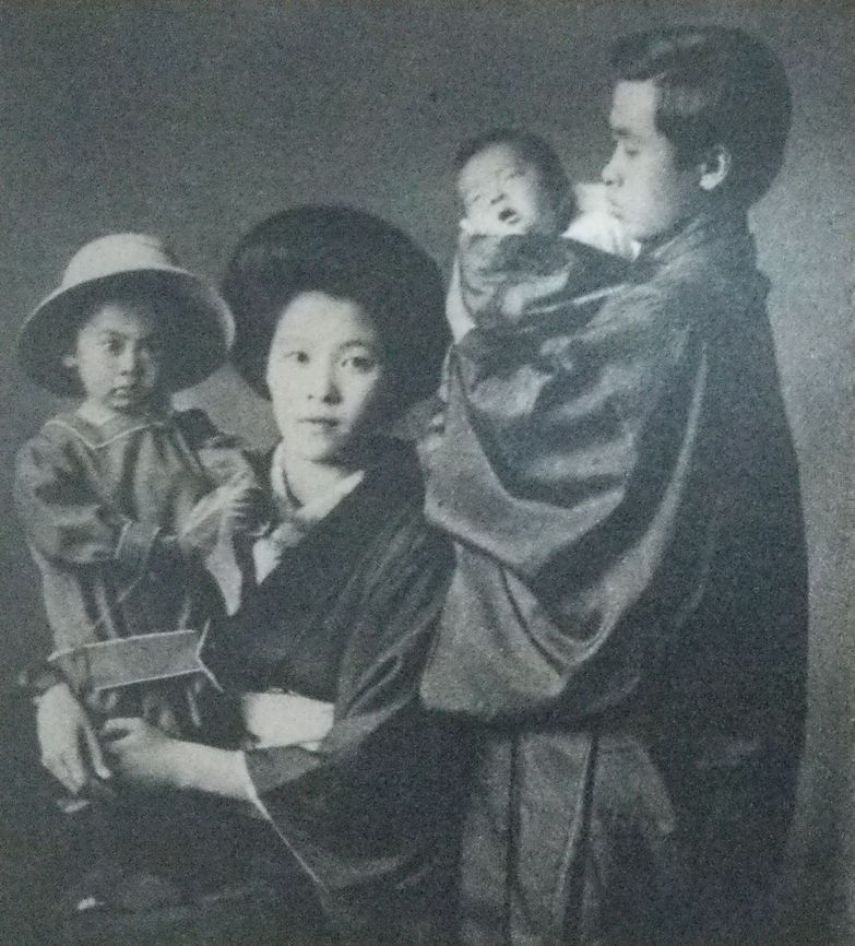 末弘厳太郎と家族